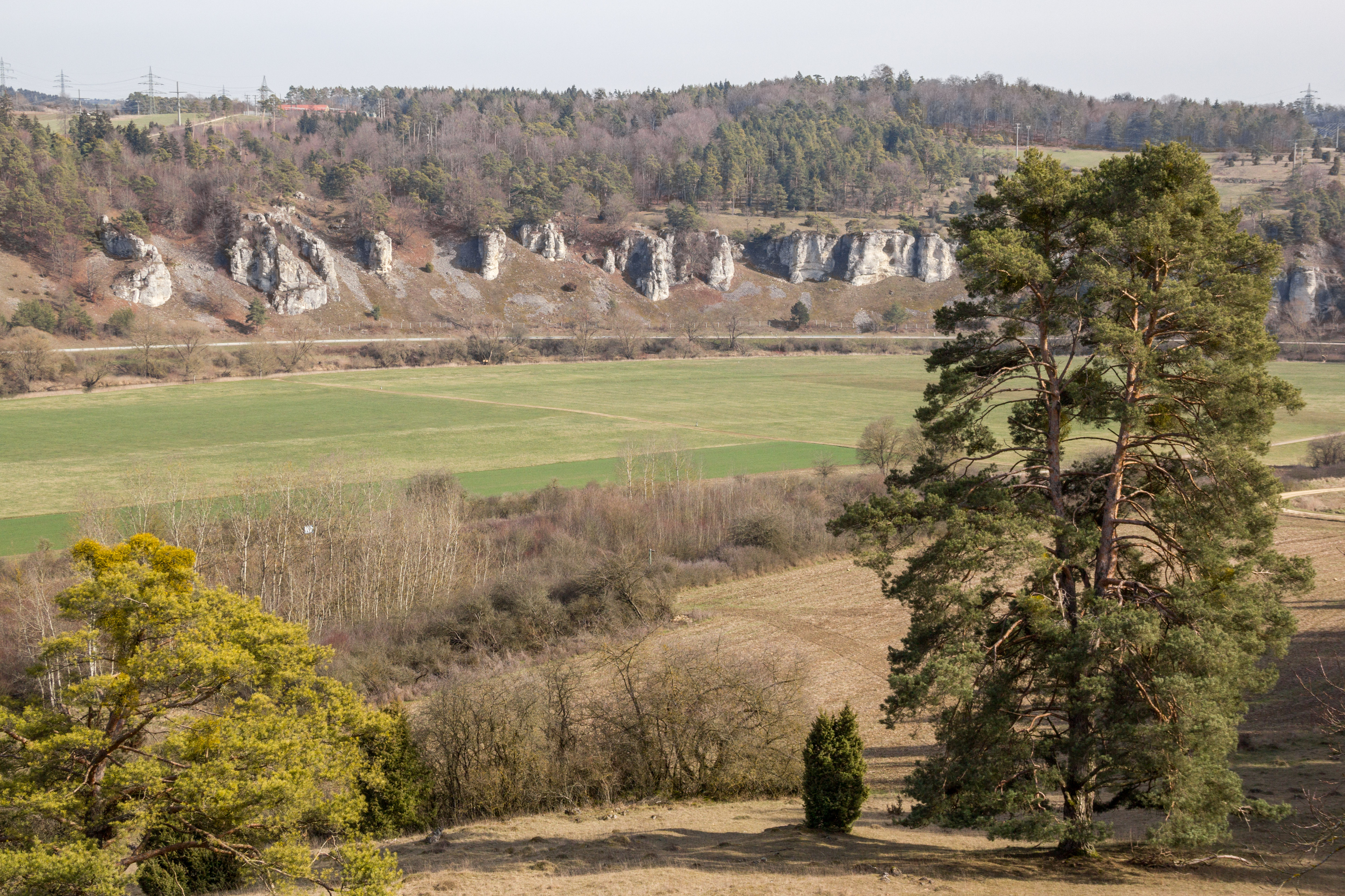 Zwölf Apostel, Naturschutzgebiet, Geotop, Naturpark Altmühltal, Solnhofen